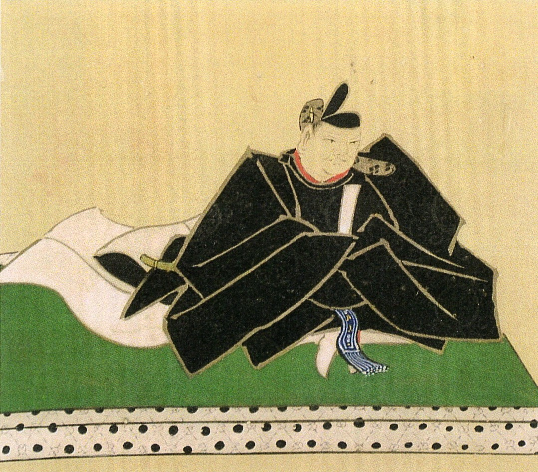 遠江掛川藩、山城伏見藩、伊勢桑名藩主・松平定勝の肖像画。